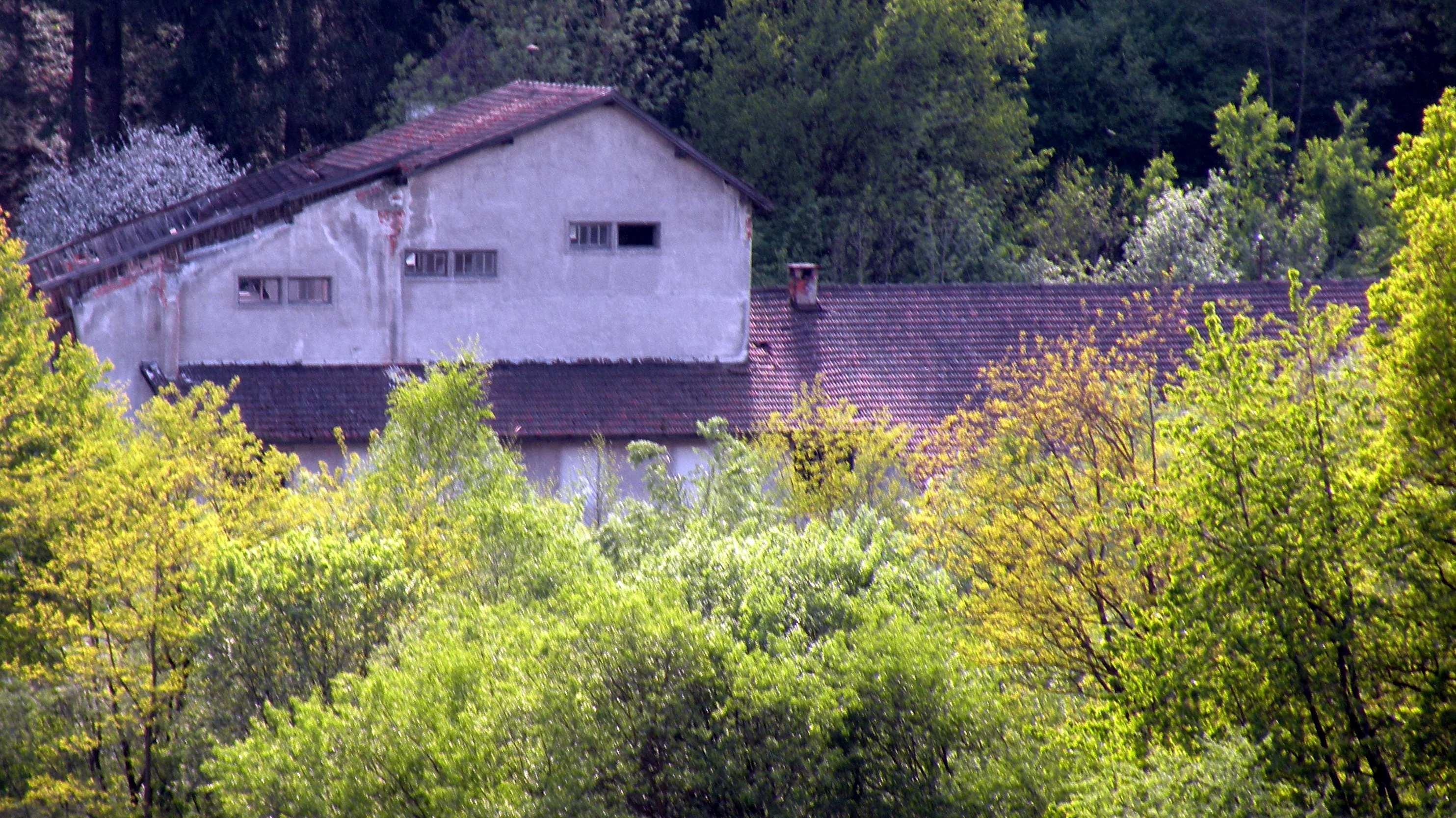 Verlassenes Betriebsgebäude der Kamig in der Katastralgemeinde Weinzierl der Stadtgemeinde Perg, ehemaliges Kaolin-Abbaugebiet